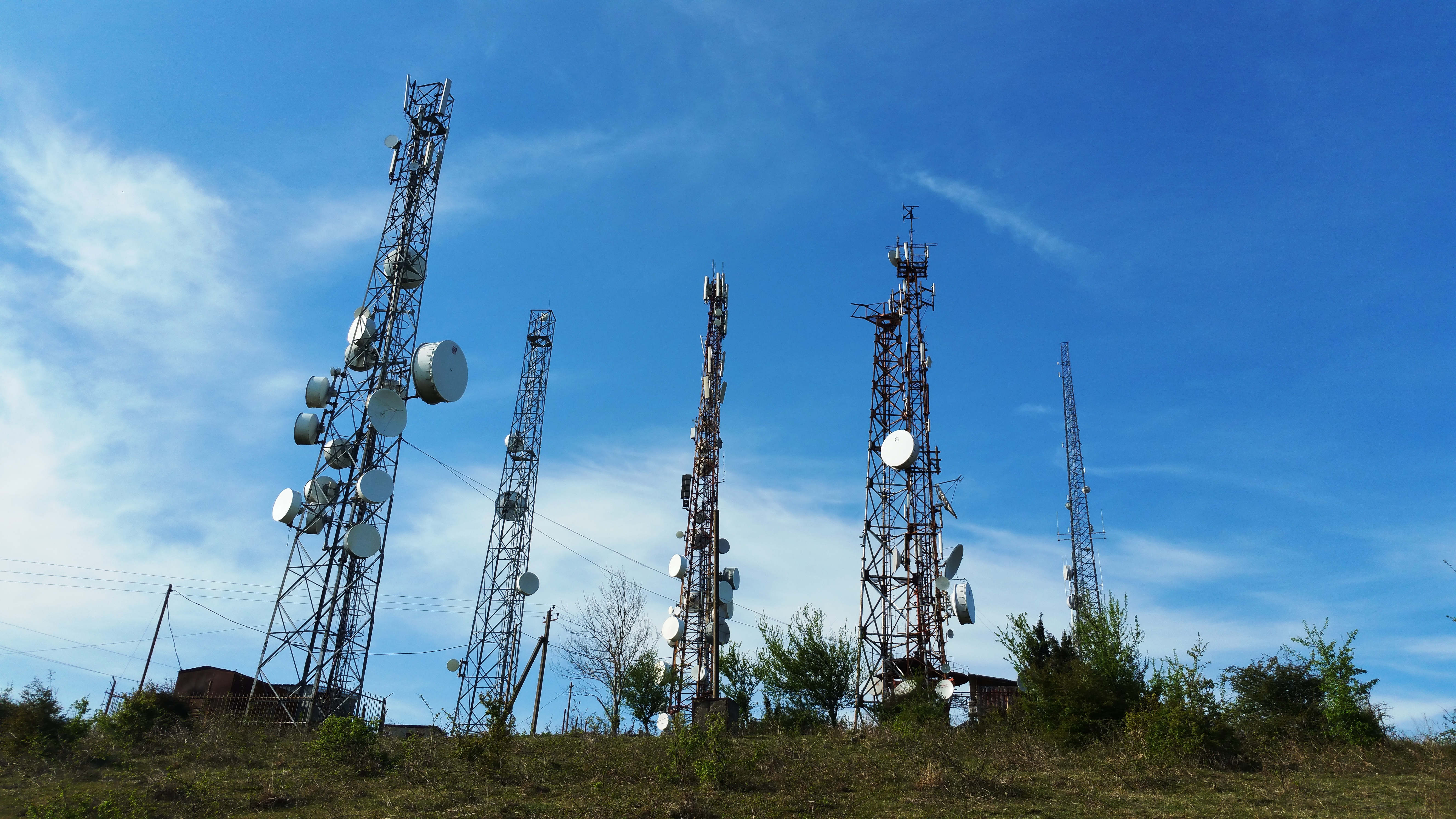 სატელეკომუნიკაციო ანძები სენაკში